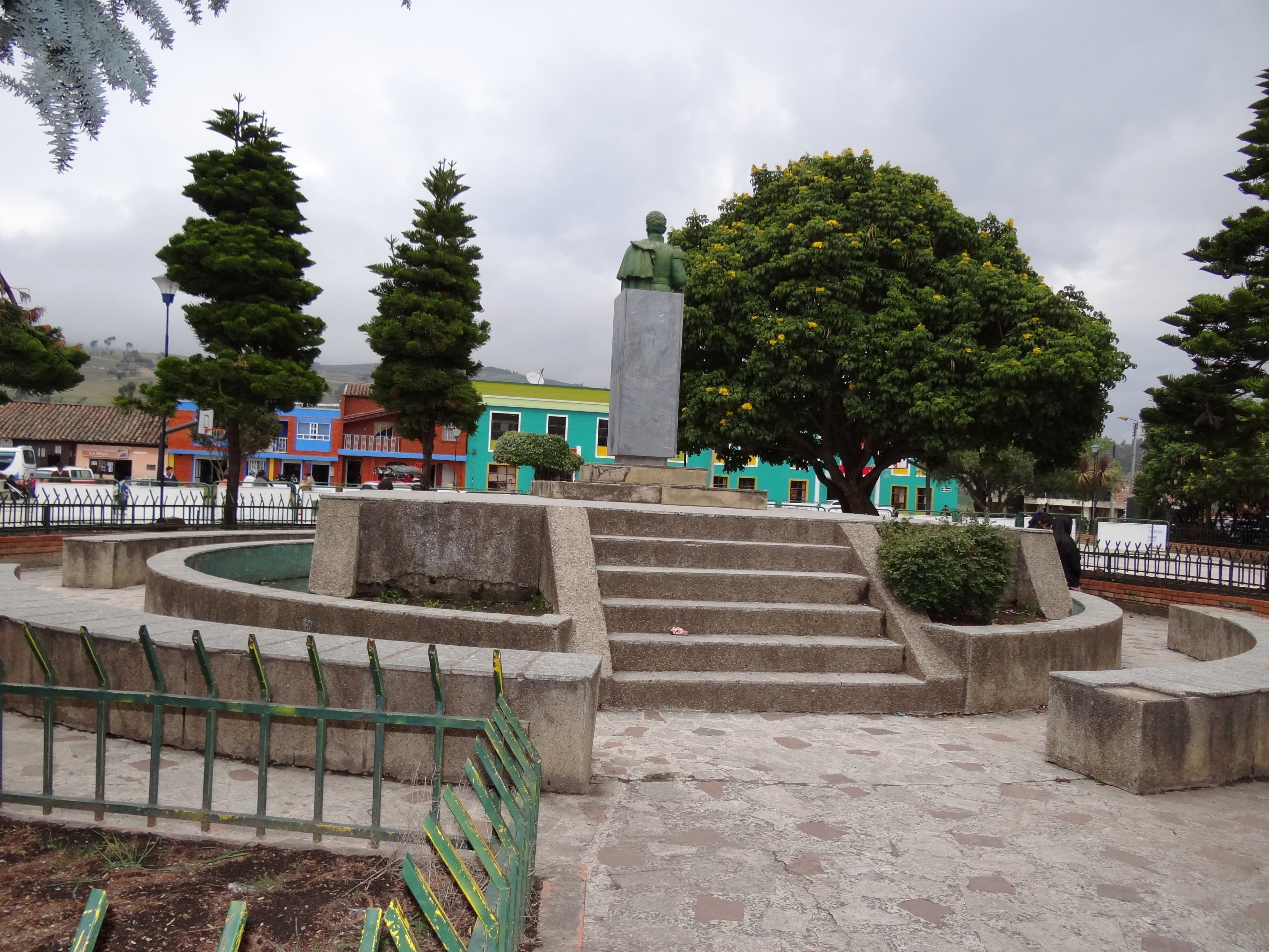 Parque principal del municipio de Siachoque, departamento de Boyacá, Colombia